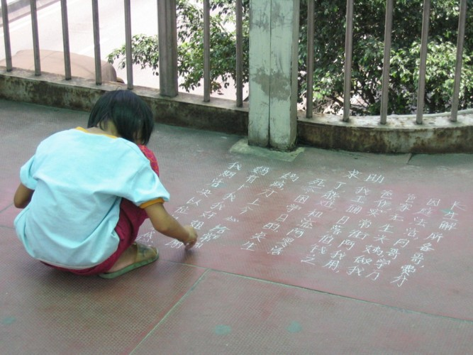 La petite fille à la craie, août 2005, Canton, Chine.